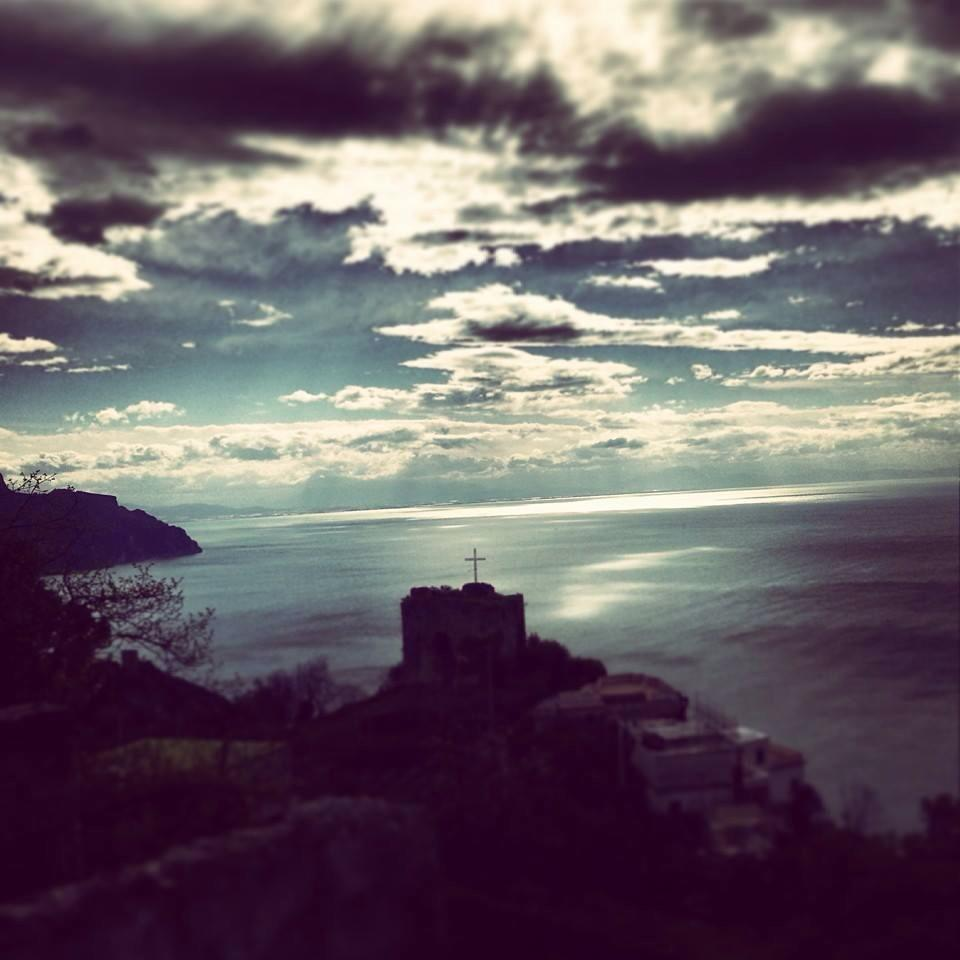 La Torre di Pogerola